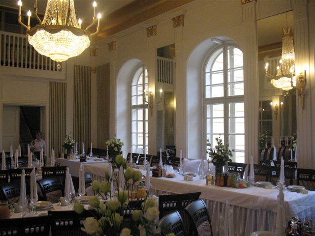 jedna z sal bażantarni książęcej